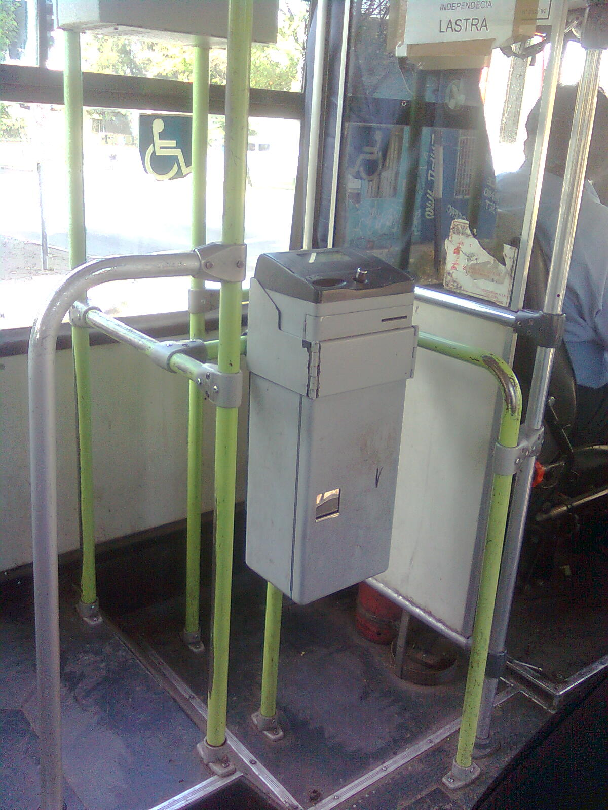 Cobrador exacto de monedas en el sistema de transporte Transantiago.